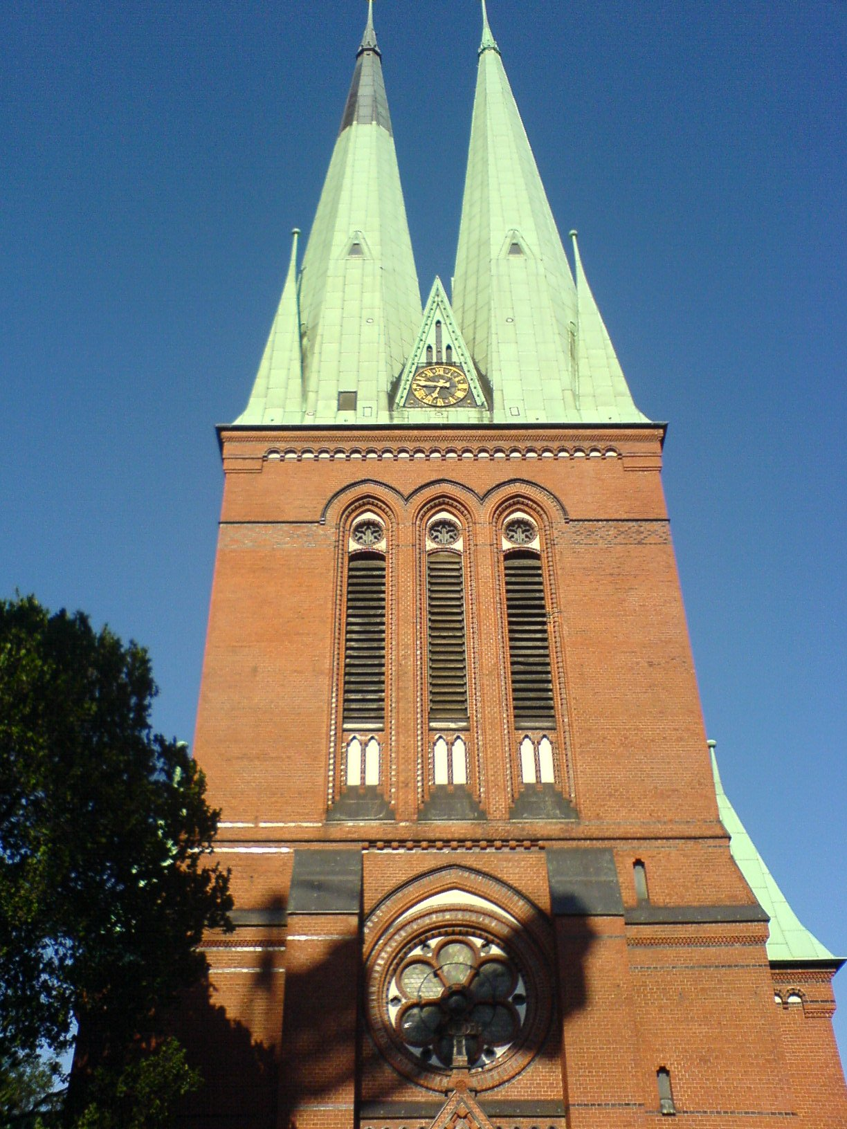 Bildbeschreibung: St. Petri Altona Fotograf/Zeichner: PodracerHH 23:45, 10. Jul 2006 (CEST) Datum: 07.2006 Sonstiges: ...